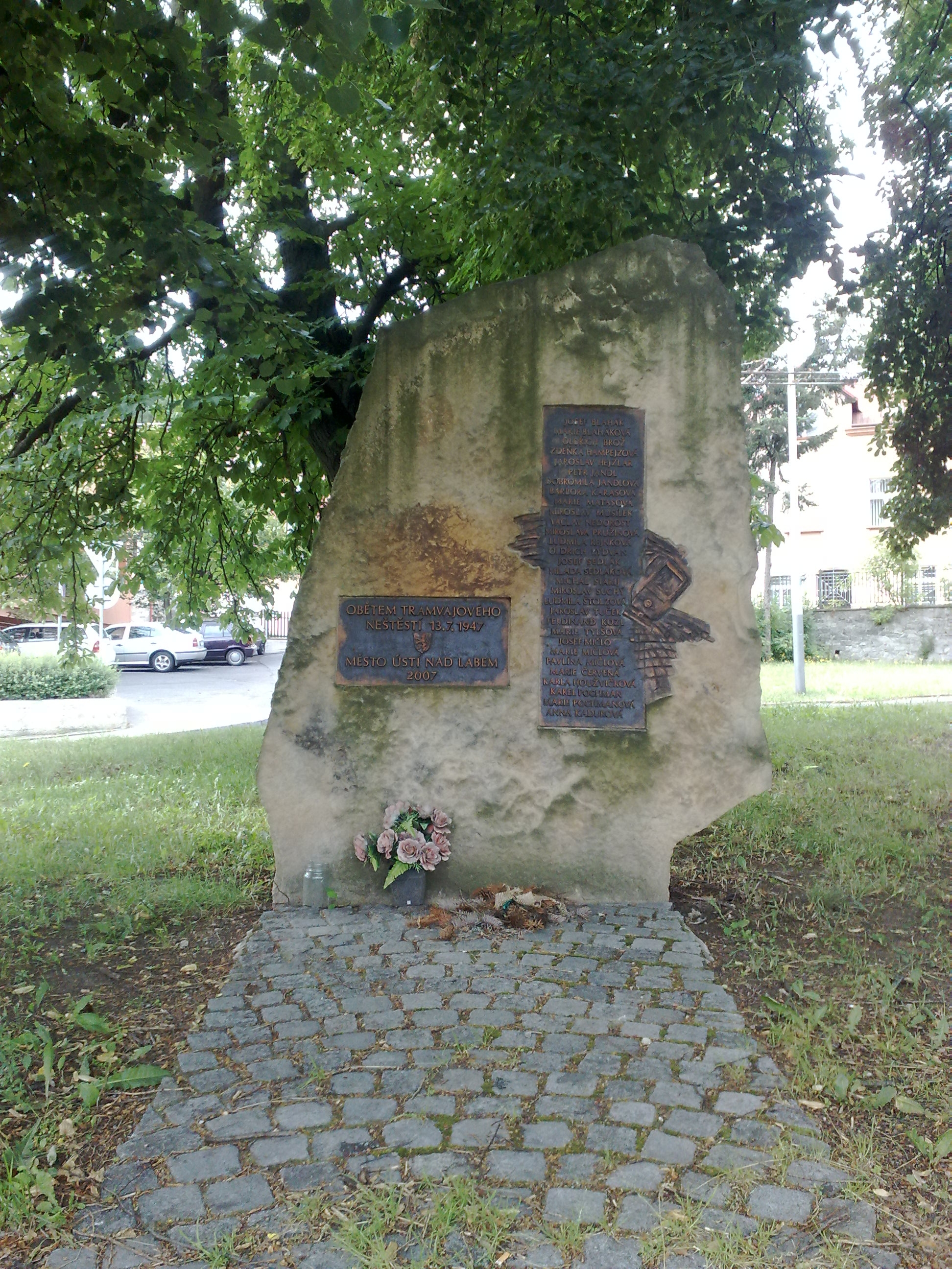 Pomník obětem tramvajového neštěstí z 13.7.1947 v Ústí nad Labem. OBĚTEM TRAMVAJOVÉHO NEŠTĚSTÍ 13. 7. 1947 MĚSTO ÚSTÍ NAD LABEM 2007 JOSEF BLAHÁK MARIE BLAHÁKOVÁ OLDŘICH BROŽ ZDEŇKA HAMPEJZOVÁ JAROSLAV HEJZLAR PETR JANDL DOBROMILA JANDLOVÁ BARBORA KARASOVÁ MARIE MATASOVÁ MIROSLAV MUSÍLEK VÁCLAV NEDOROST MIROSLAVA PRUŽINOVÁ LUDMILA REJNKOVÁ OLDŘICH RYDVAN JOSEF SEDLÁK MILADA SEDLÁKOVÁ MICHAL SIARIJ MIROSLAV SUCHÝ LUDMILA ŠTOLZOVÁ JAROSLAV TUČEK FERDINAND KOZL MARIE TYLŠOVÁ JOSEF MIČLO MARIE MIČLOVÁ PAVLÍNA MIČLOVÁ MARIE ČERVENÁ KARLA HOUŽVIČKOVÁ KAREL POCHMAN MARIE POCHMANOVÁ ANNA KADUROVÁ